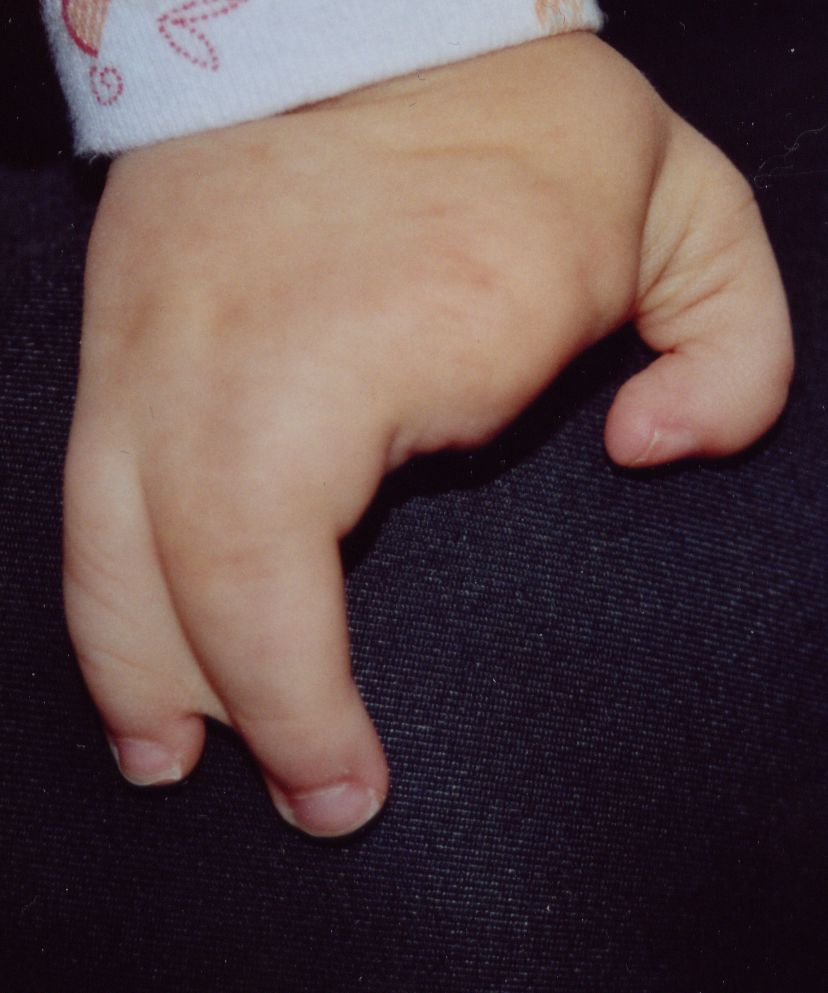 Ectrodactylie main droite un an